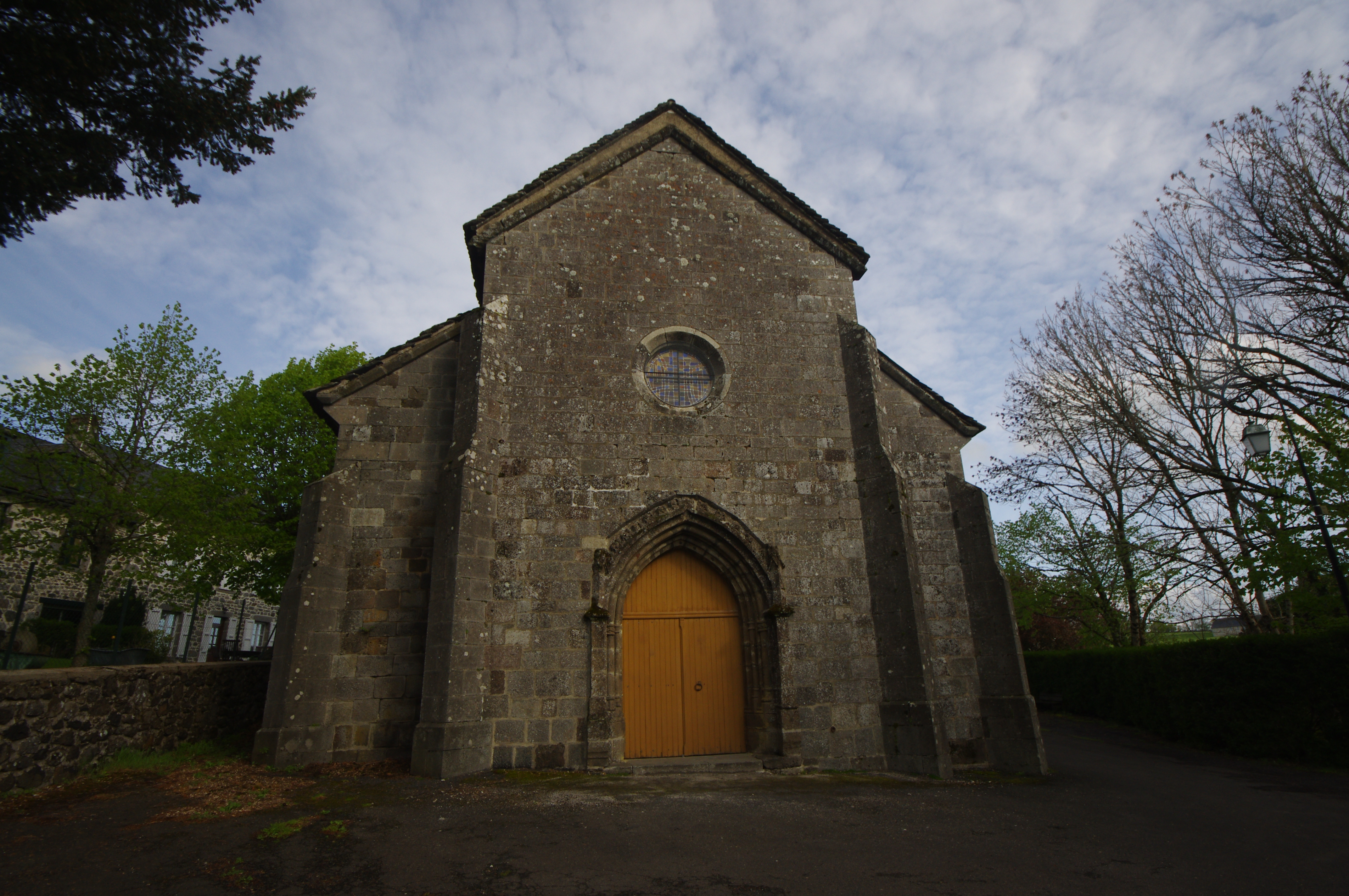 Église Saint-Barthélemy